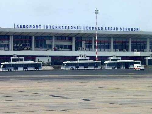 Senegal Aeroport Leopold Sedar Sengor (Dakar)